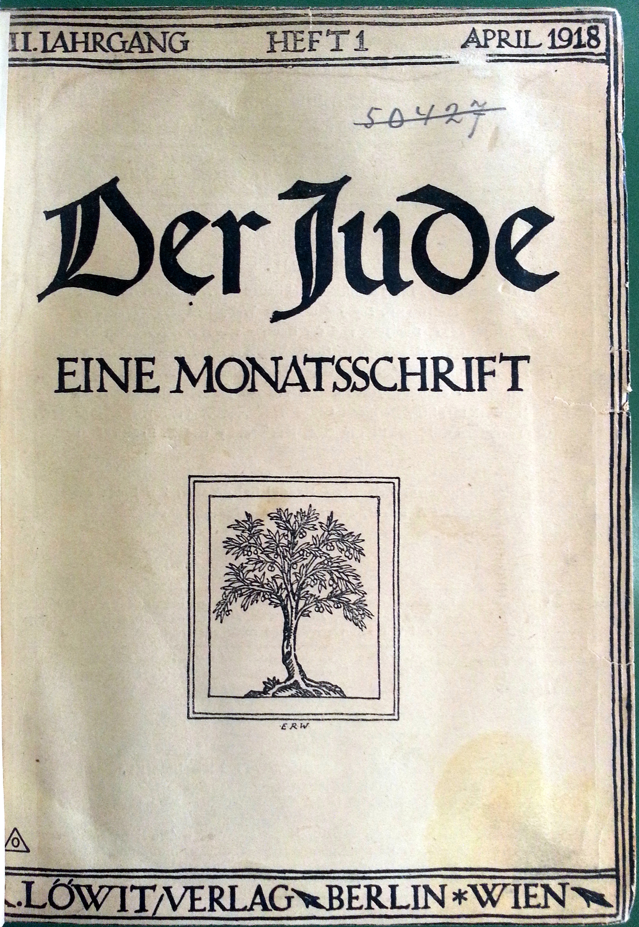 Der Jude שער כתב העת